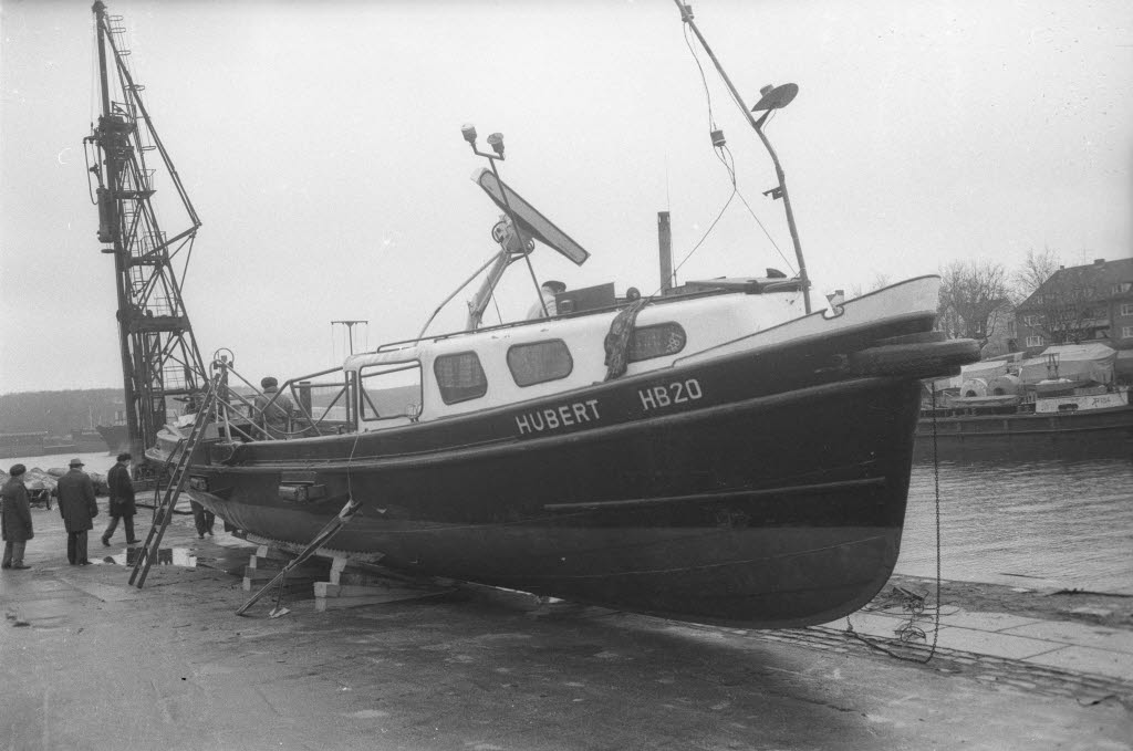 nach der Bergung auf der Schleuseninsel. Die Kanalfähre wurde am Abend des 28.01.1977 zwischen der Wik und Holtenau vom Frachter BALTISKIJ 37 (russ.) überfahren und versenkt.